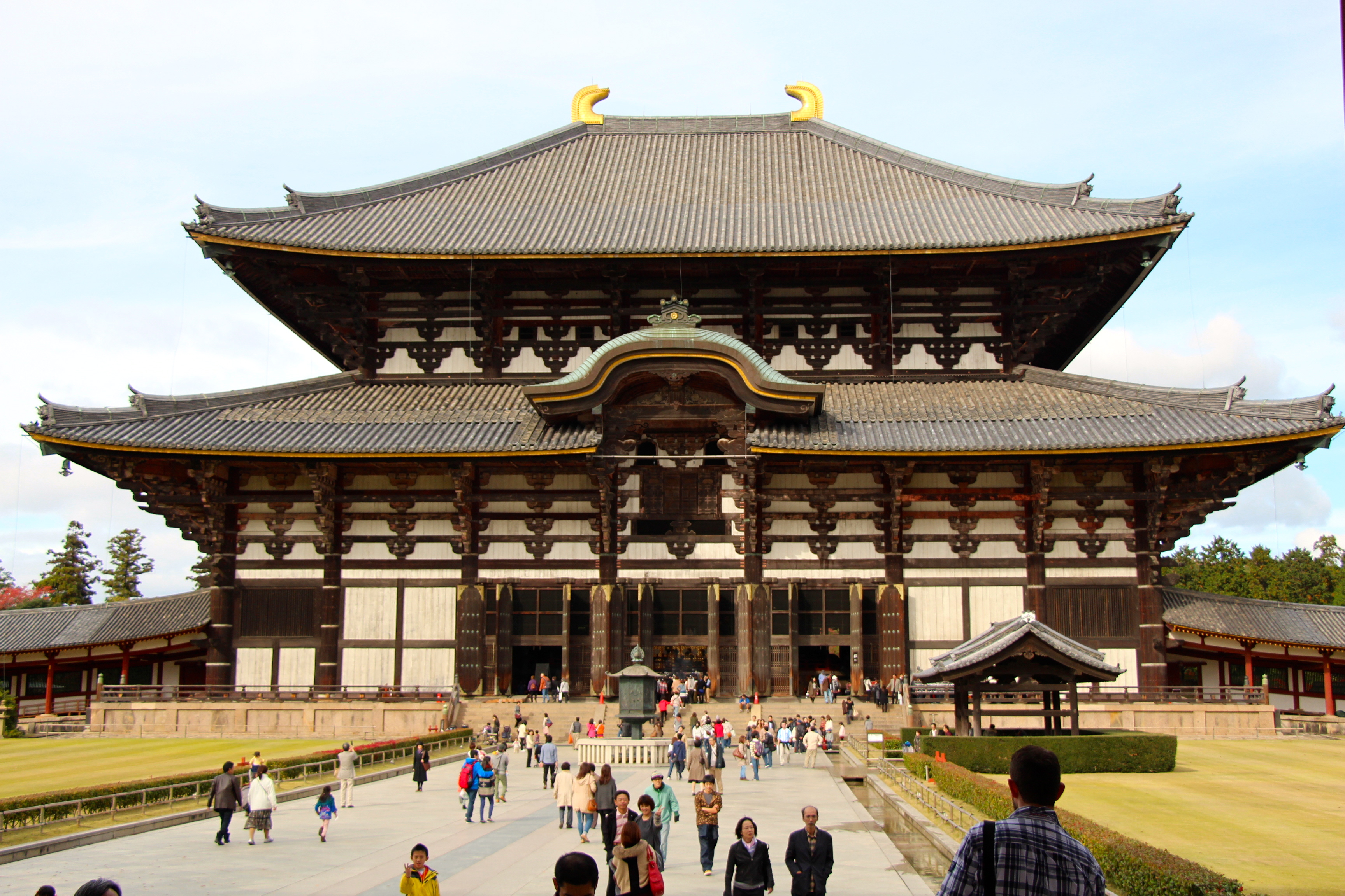 奈良 東大寺